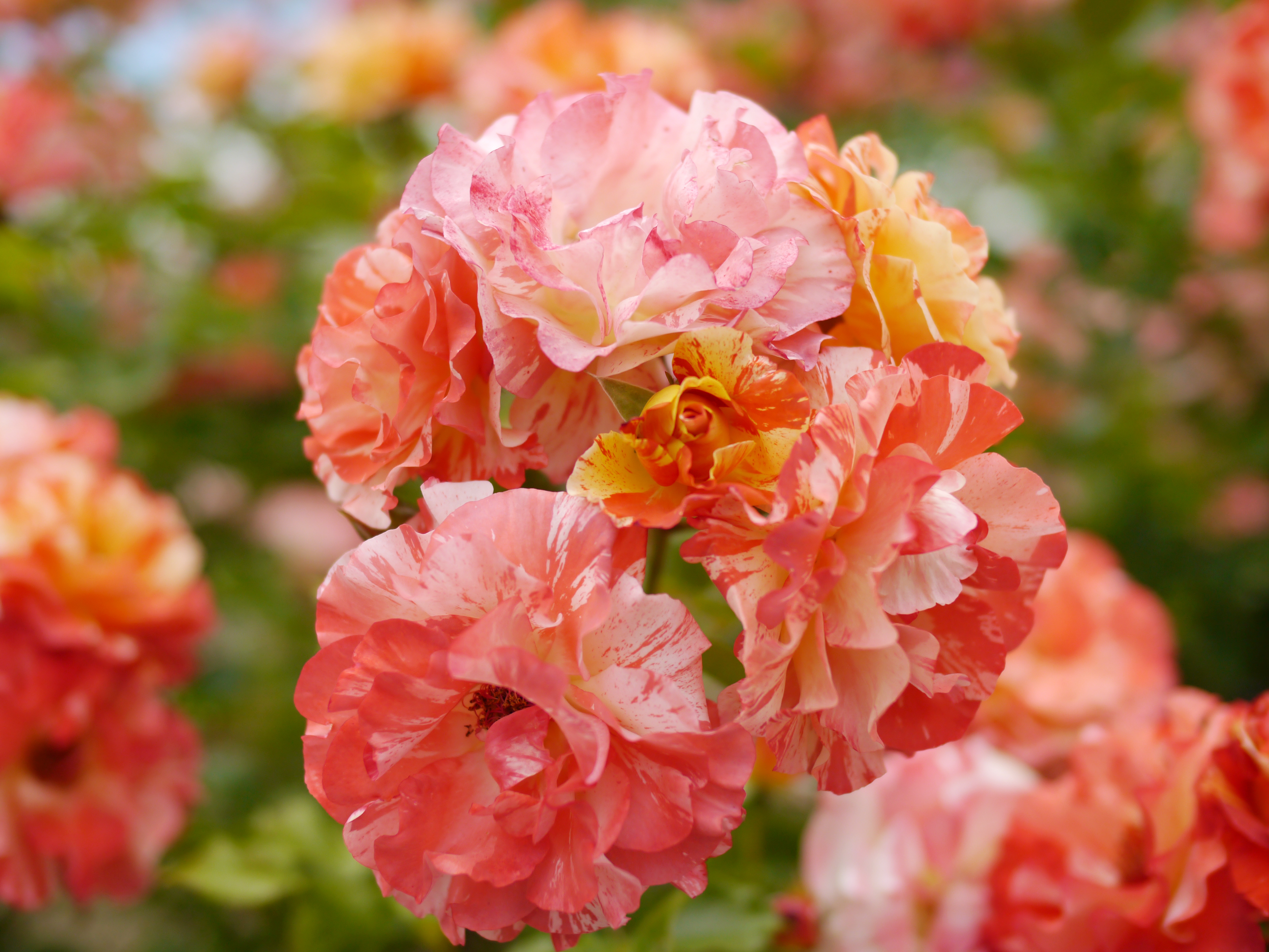 Rose, Alfred Sisley, バラ, アルフレッド シスレー, Shrub rose シュラブ France フランス Delbard 2005